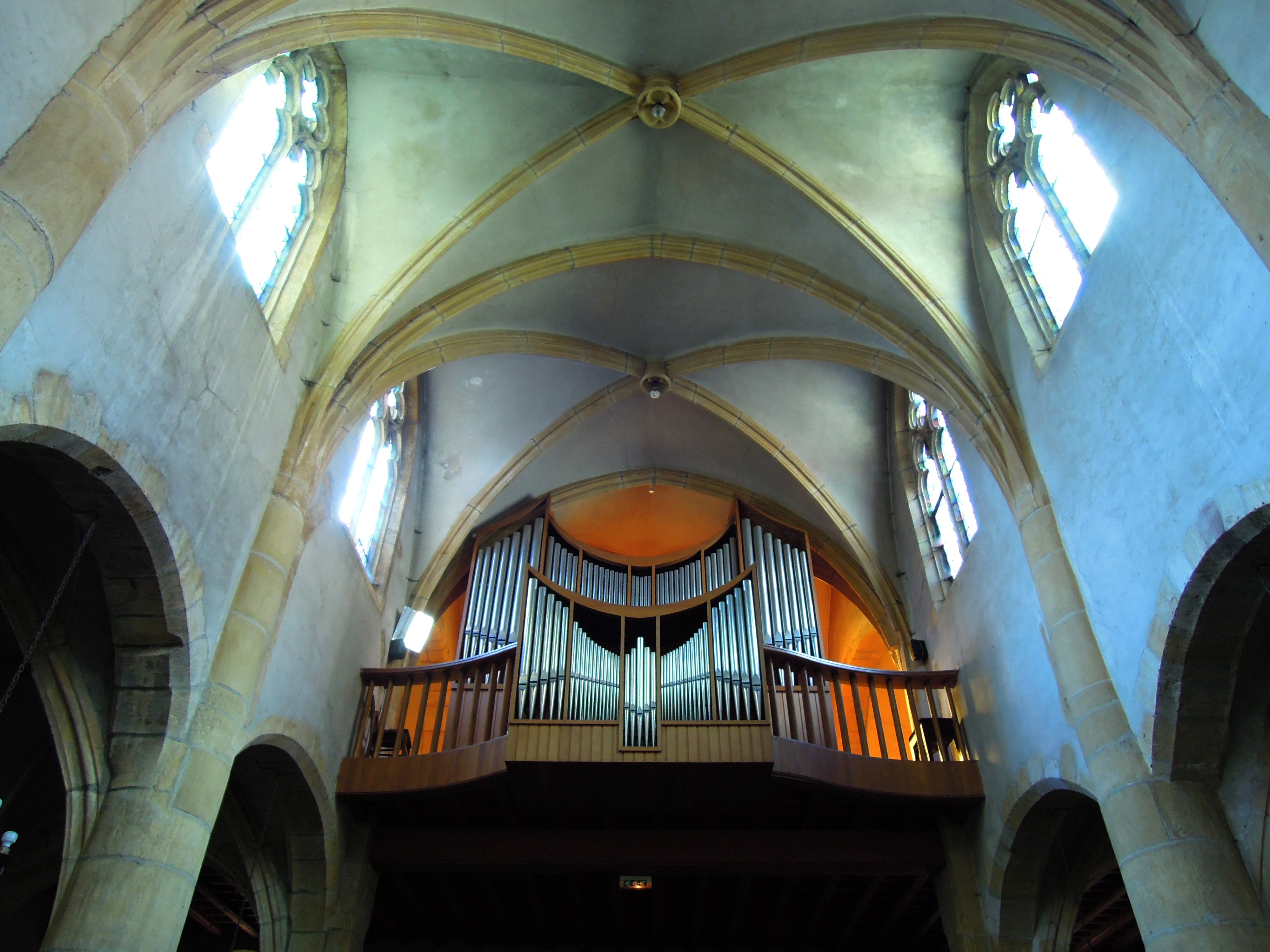 Orgue. Il fait partie avec les vitraux de Cocteau des rénovations entreprises dans les années 60 .